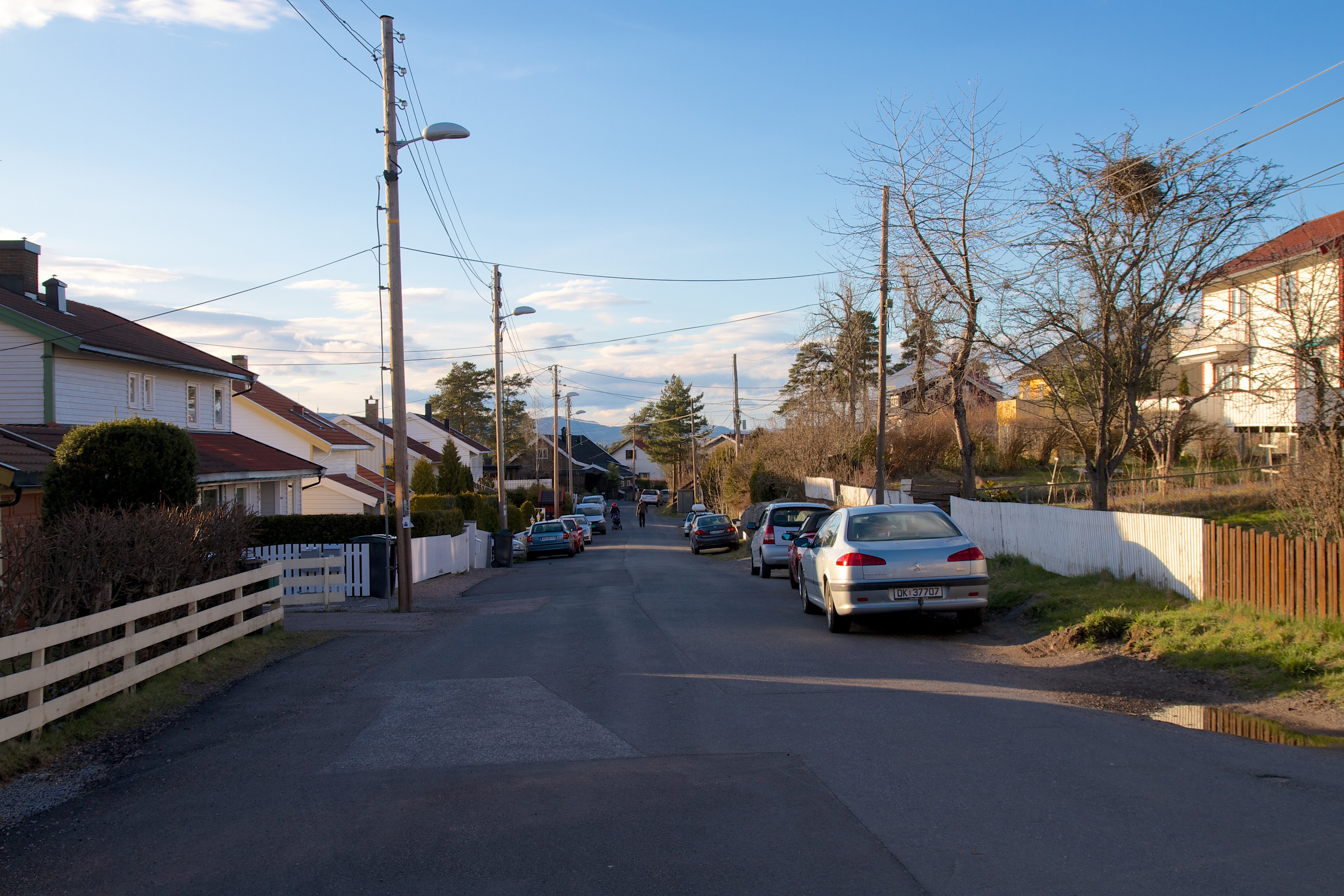 Protonveien på Bøler i Oslo.